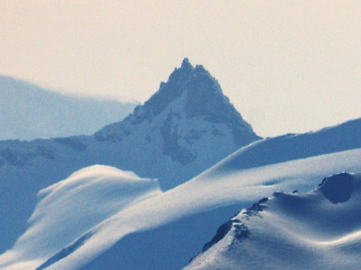 Juratinden seen from Dronningkrona.